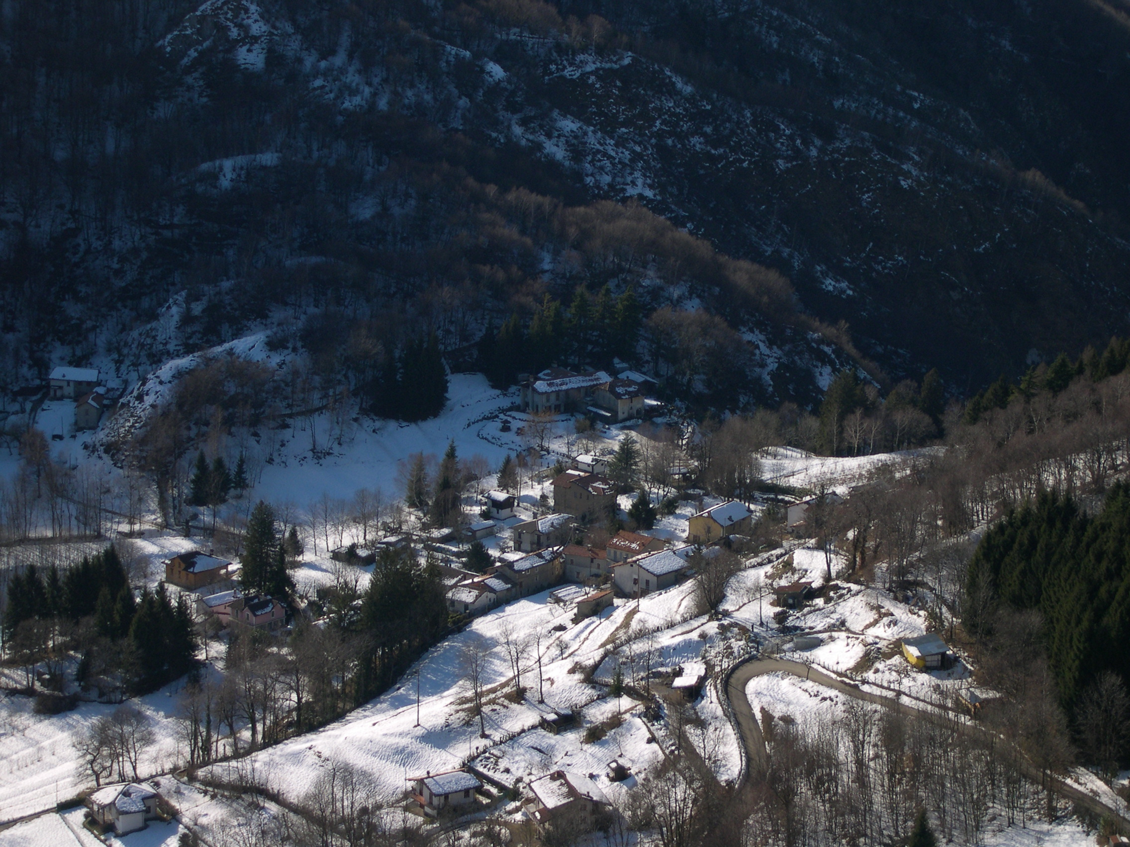 La frazione di Casere vista dai Pizzoni di Laveno